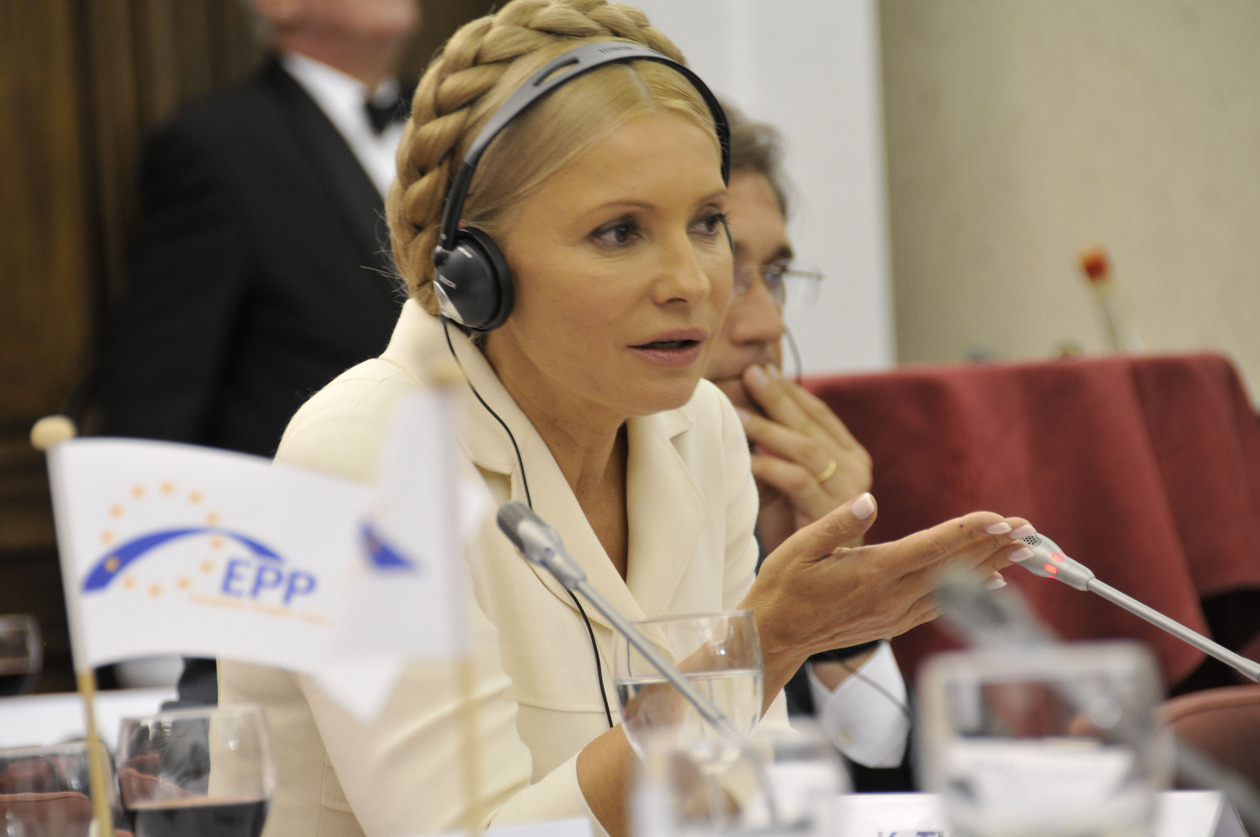 EPP Summit September 2010